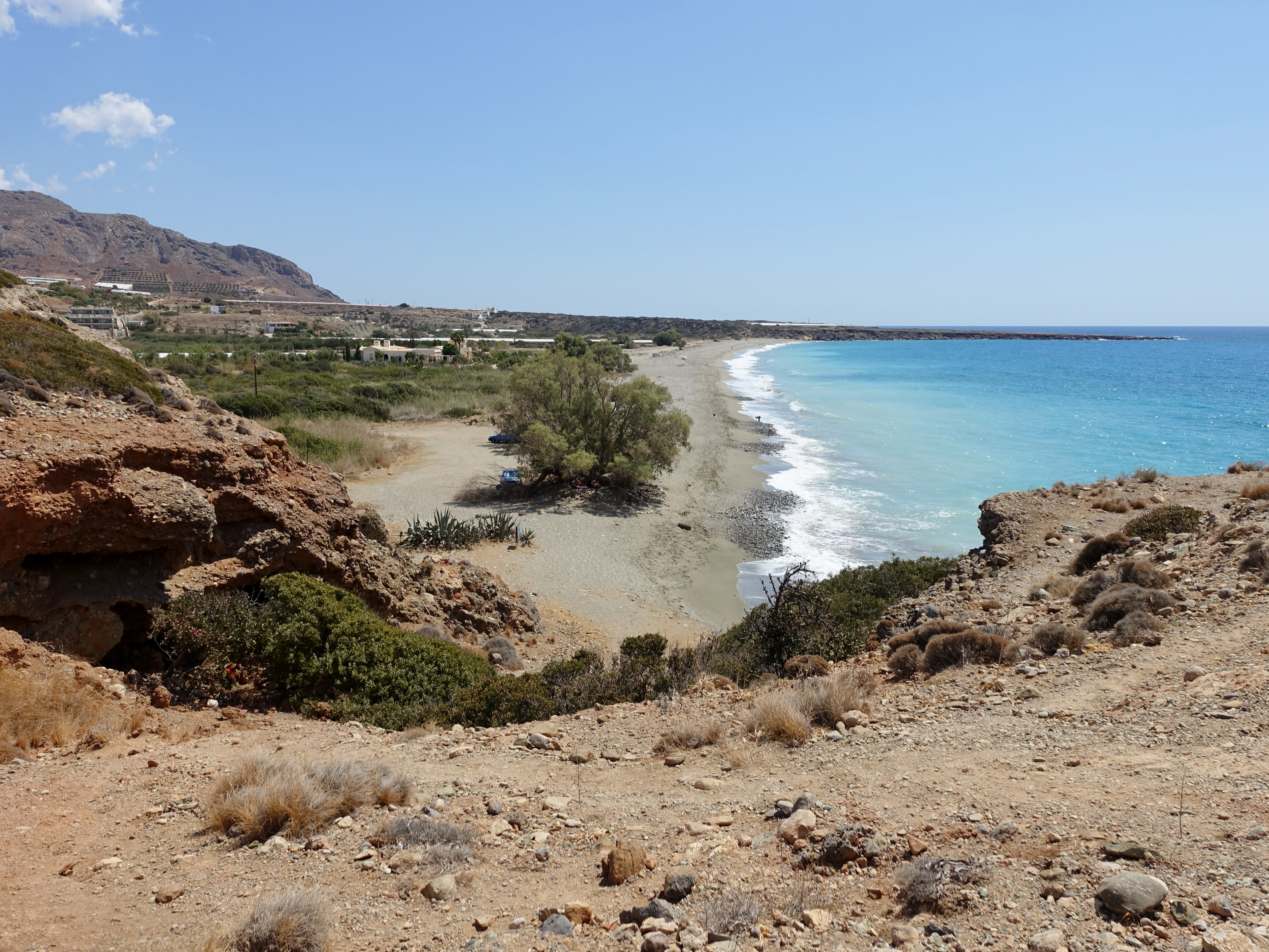 Strand von Langada (Παραλία Λαγκάδα), Gemeinde Sitia, Kreta, Griechenland